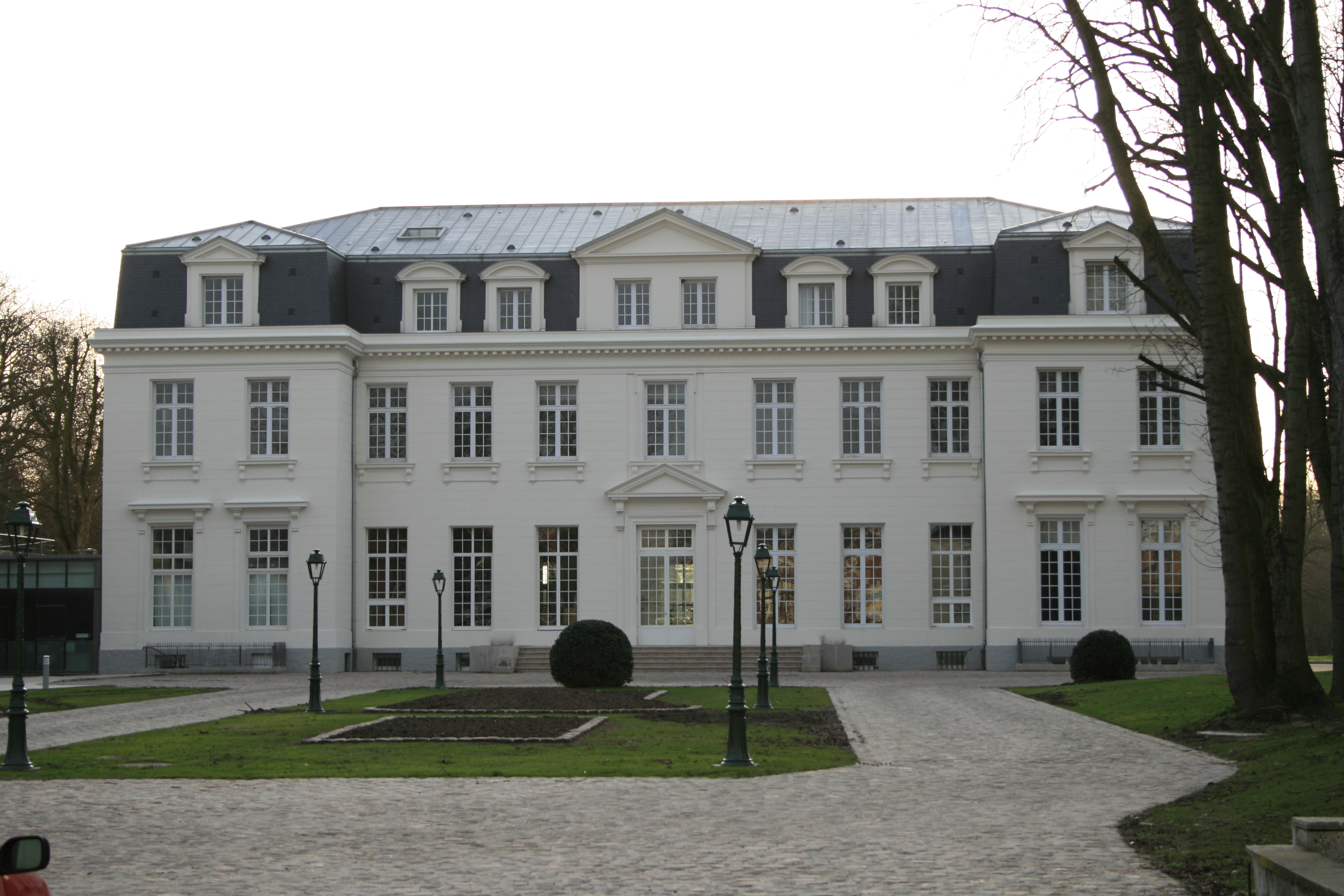 Autrefois, le château de Madame De Clercq. Aujourd'hui, le centre de réadaptation fonctionnelle.